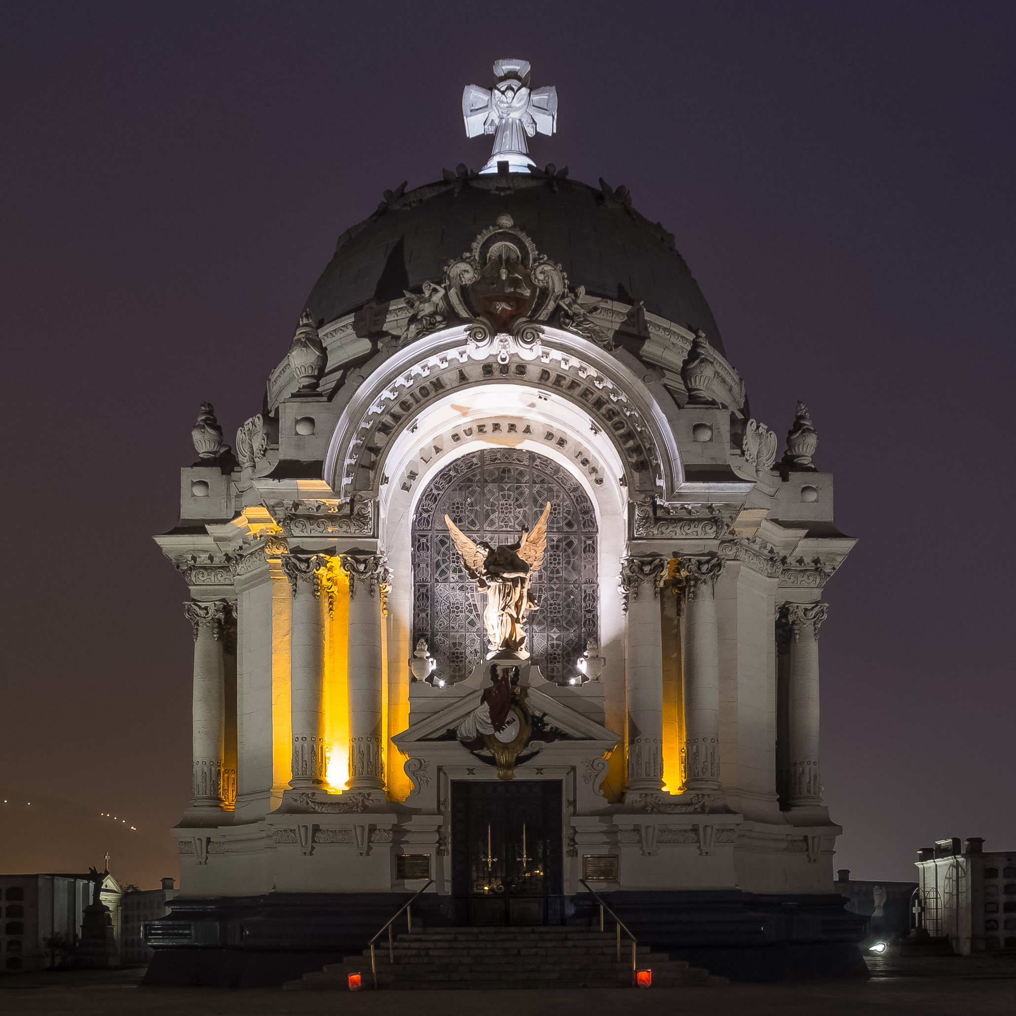 Cripta de los Heroes, tomada duran un evento fotografico en el cementerio museo Presbitero Maestro.